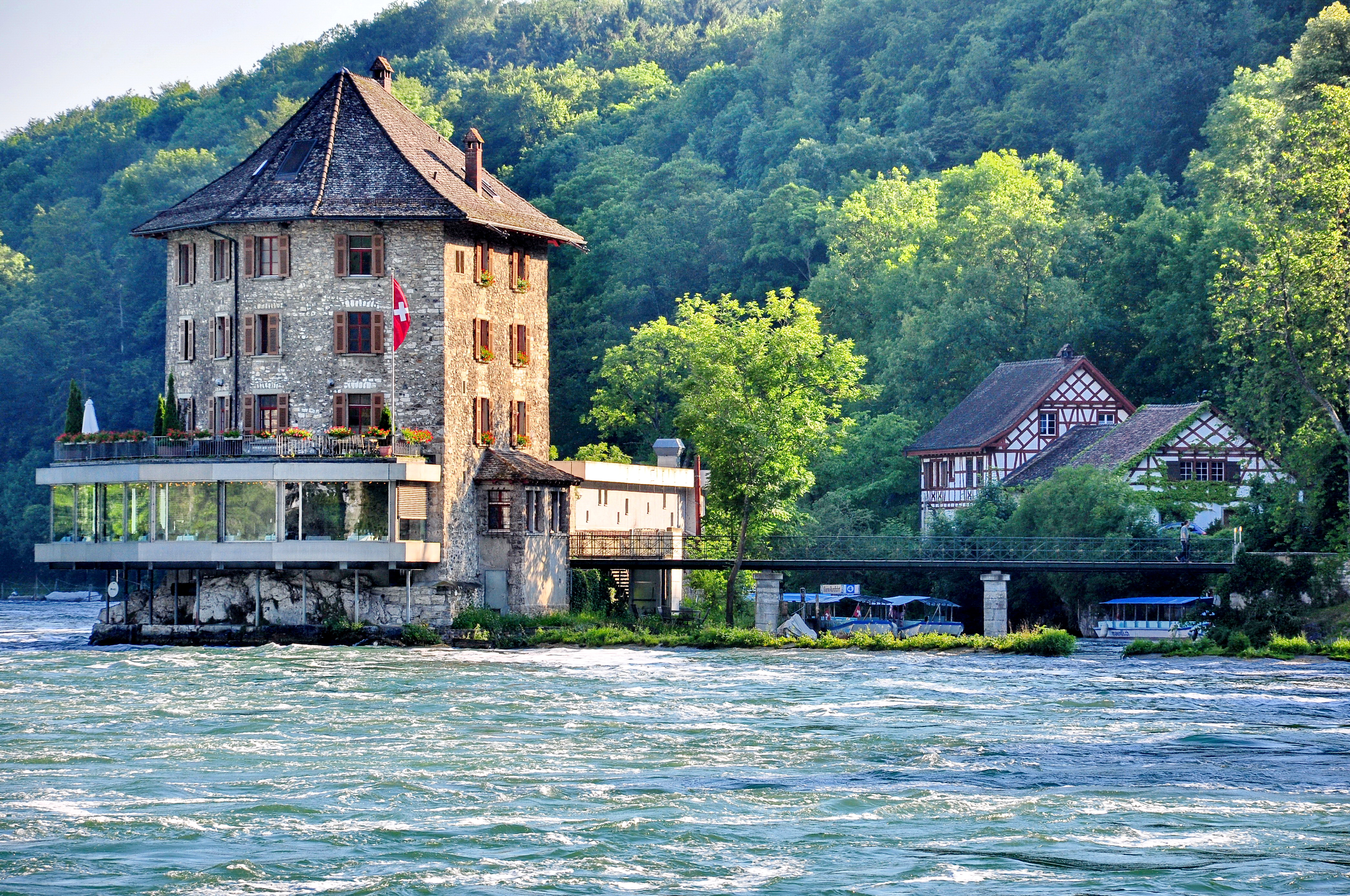 Schlössli Wörth in Neuhausen am Rheinfall (Switzerland), Rheinfall to the right.